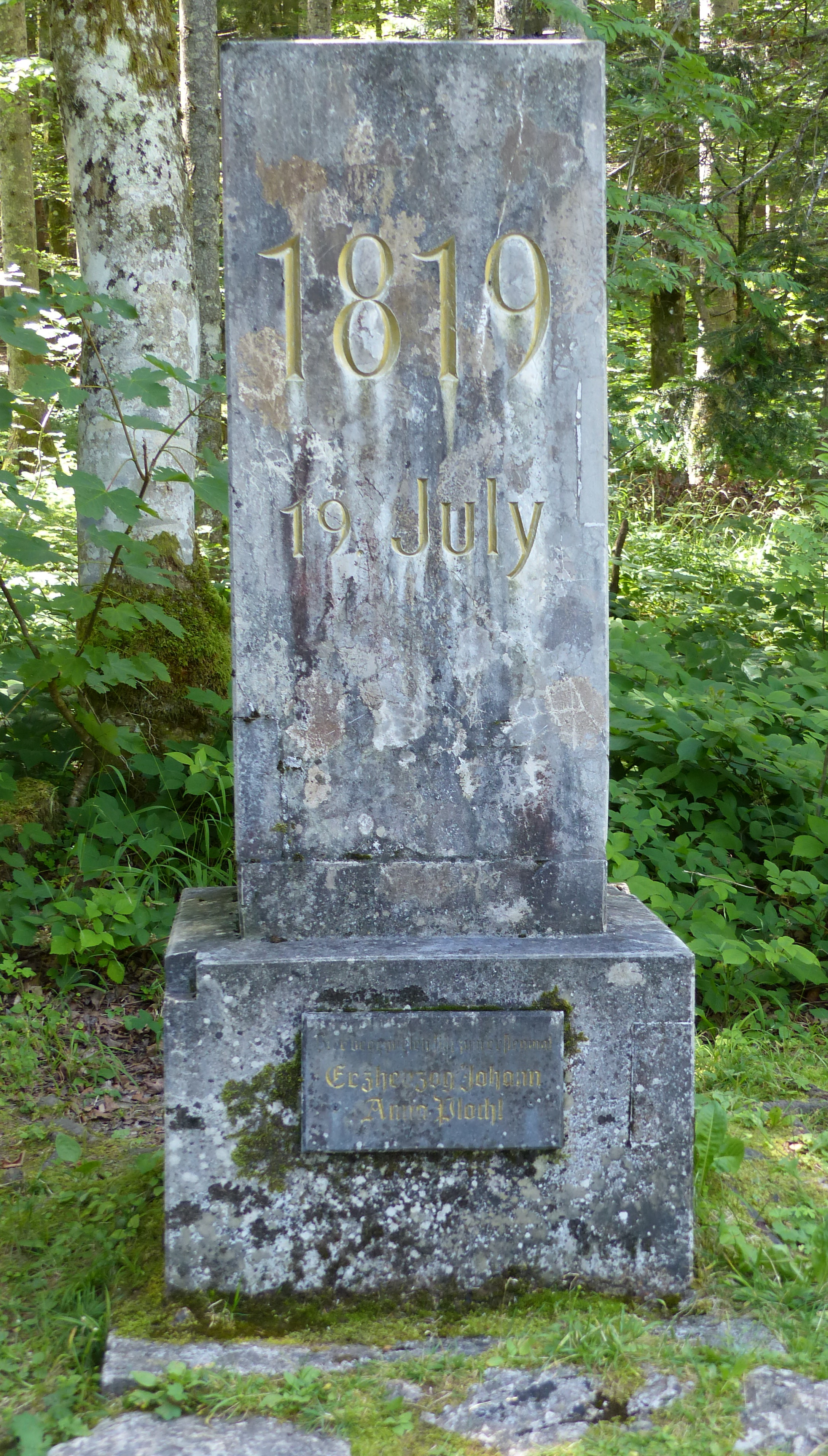 Gedenkstein am Toplitzsee (Gemeinde Grundlsee im Steirischen Salzkammergut) mit der Inschrift: " 1819 19. July Hier begegneten sich zum erstenmal Erzherzog Johann Anna Plochl"